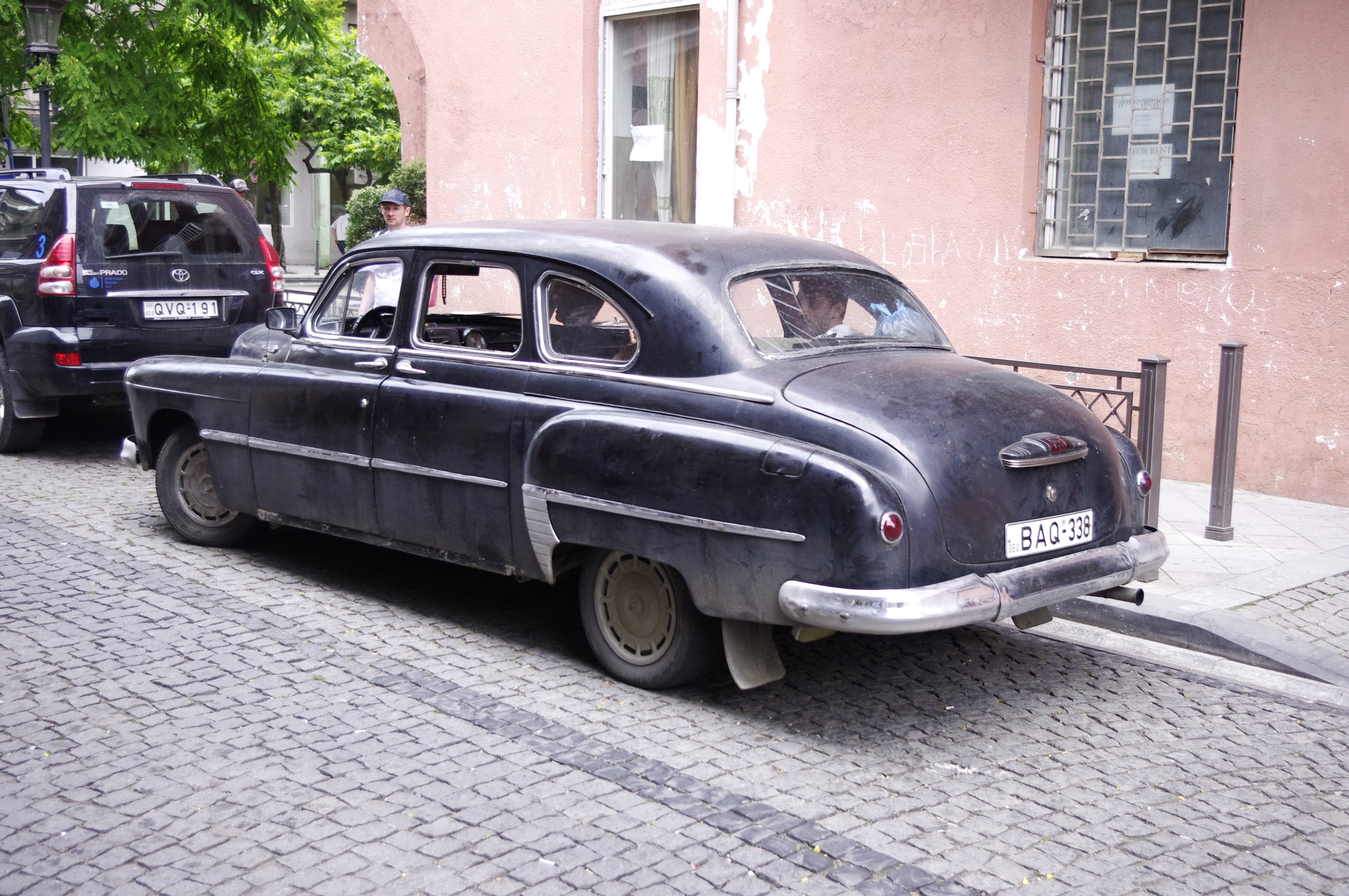 ZIM